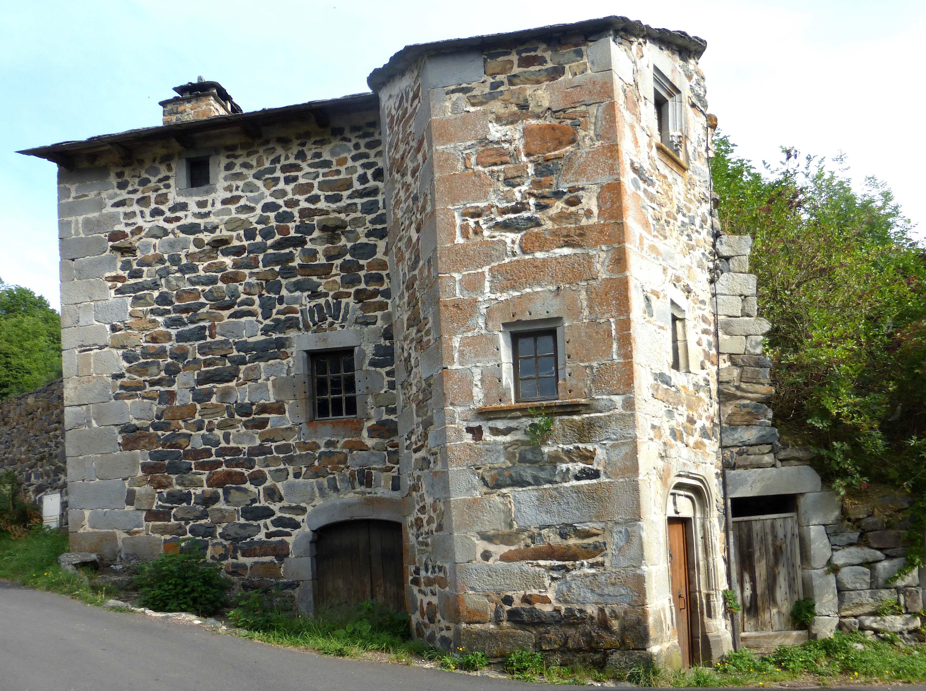 Maison Sauron Montusclat (Haute-Loire) Août 2017